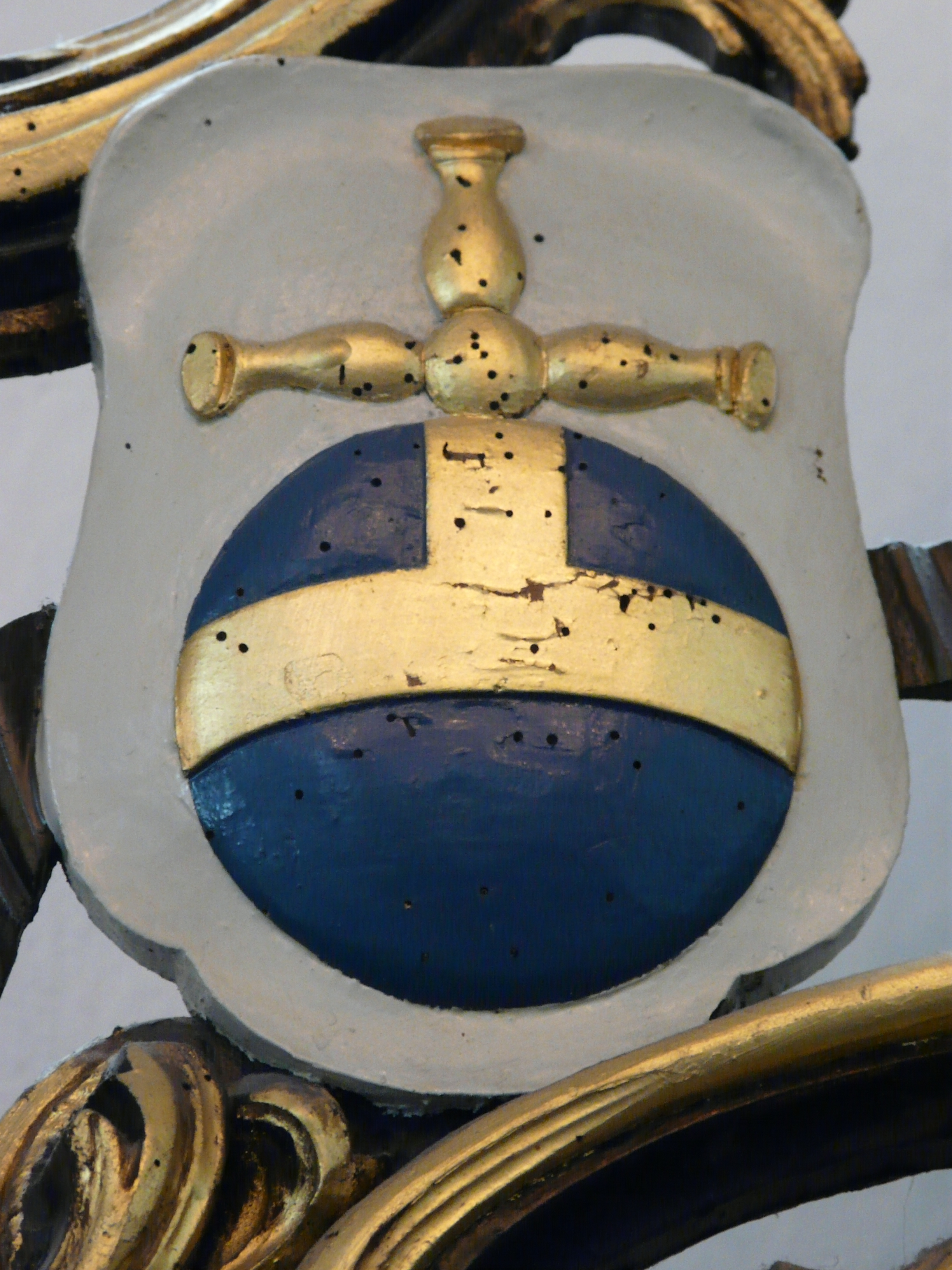 coats of arms of the former chapter of St.Salvator in Utrecht NL